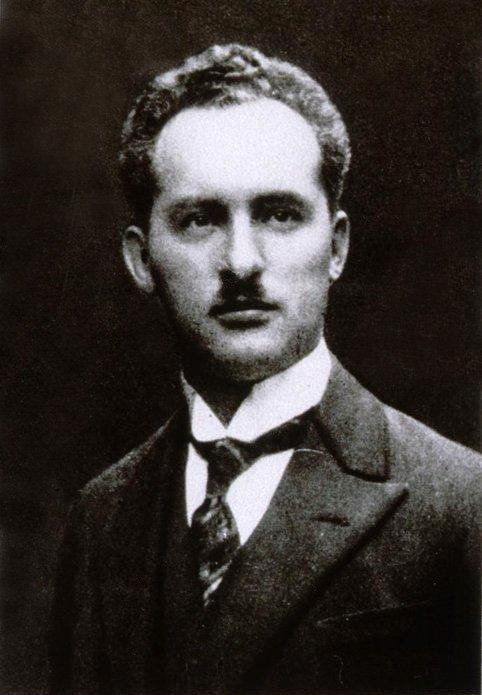 Jean Keppi, Buste, face. Bibliothèque nationale et universitaire de Strasbourg